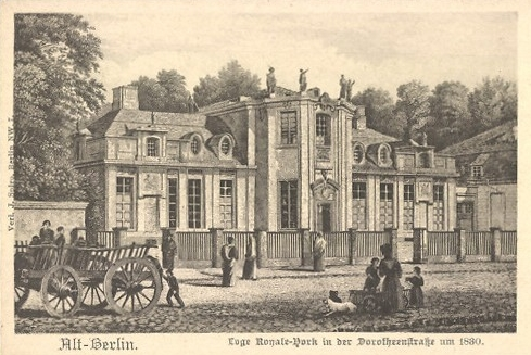 Ansicht der Loge Royal York. (Architekt Andreas Schlüter)